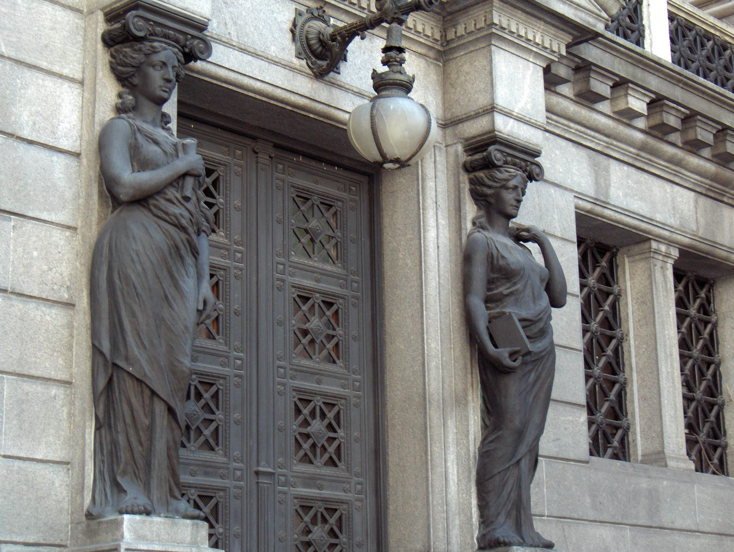 Puertas laterales del Palacio del Congreso de la Nación Argentina.